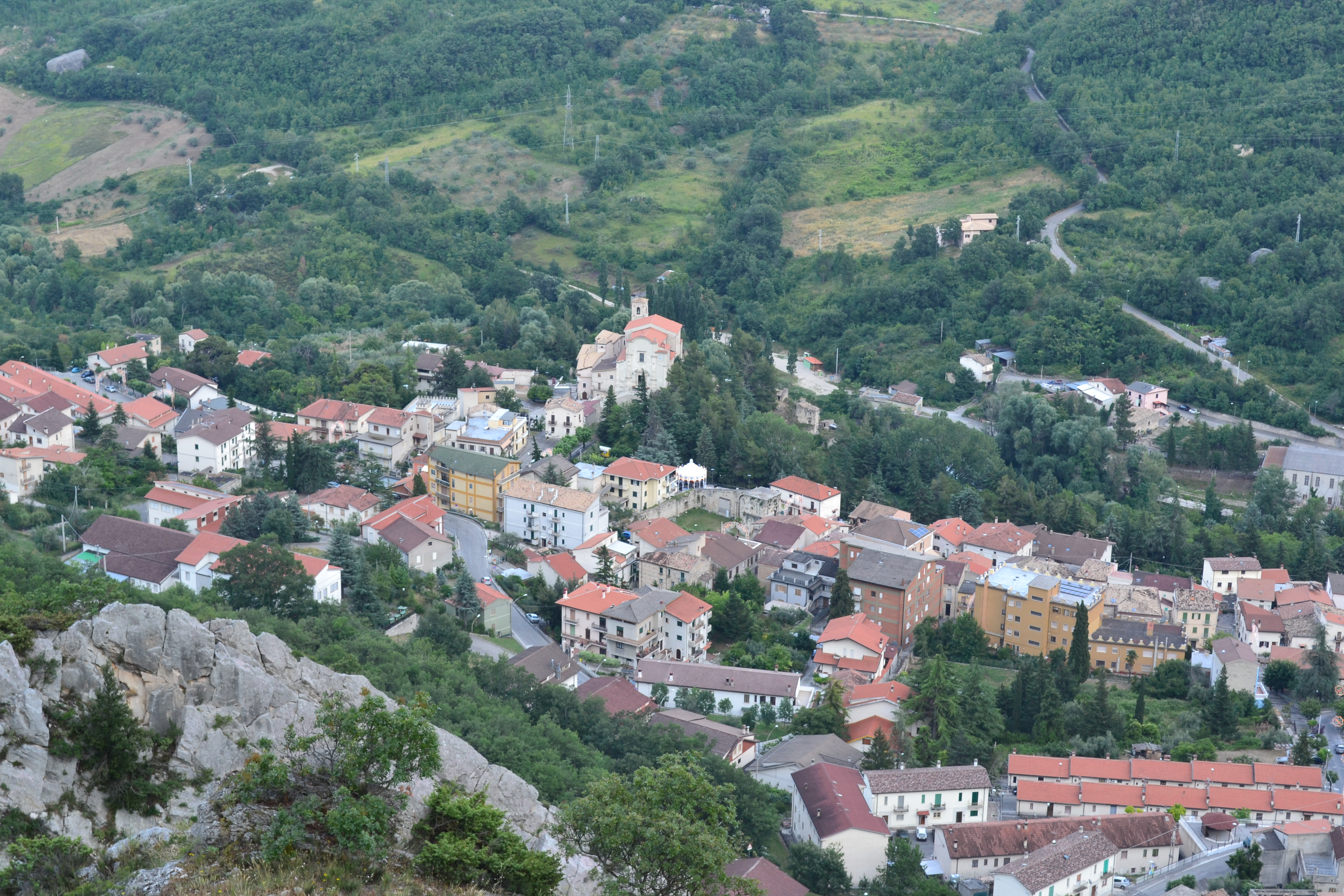 Veduta del comune di Taranta Peligna, in provincia di Chieti